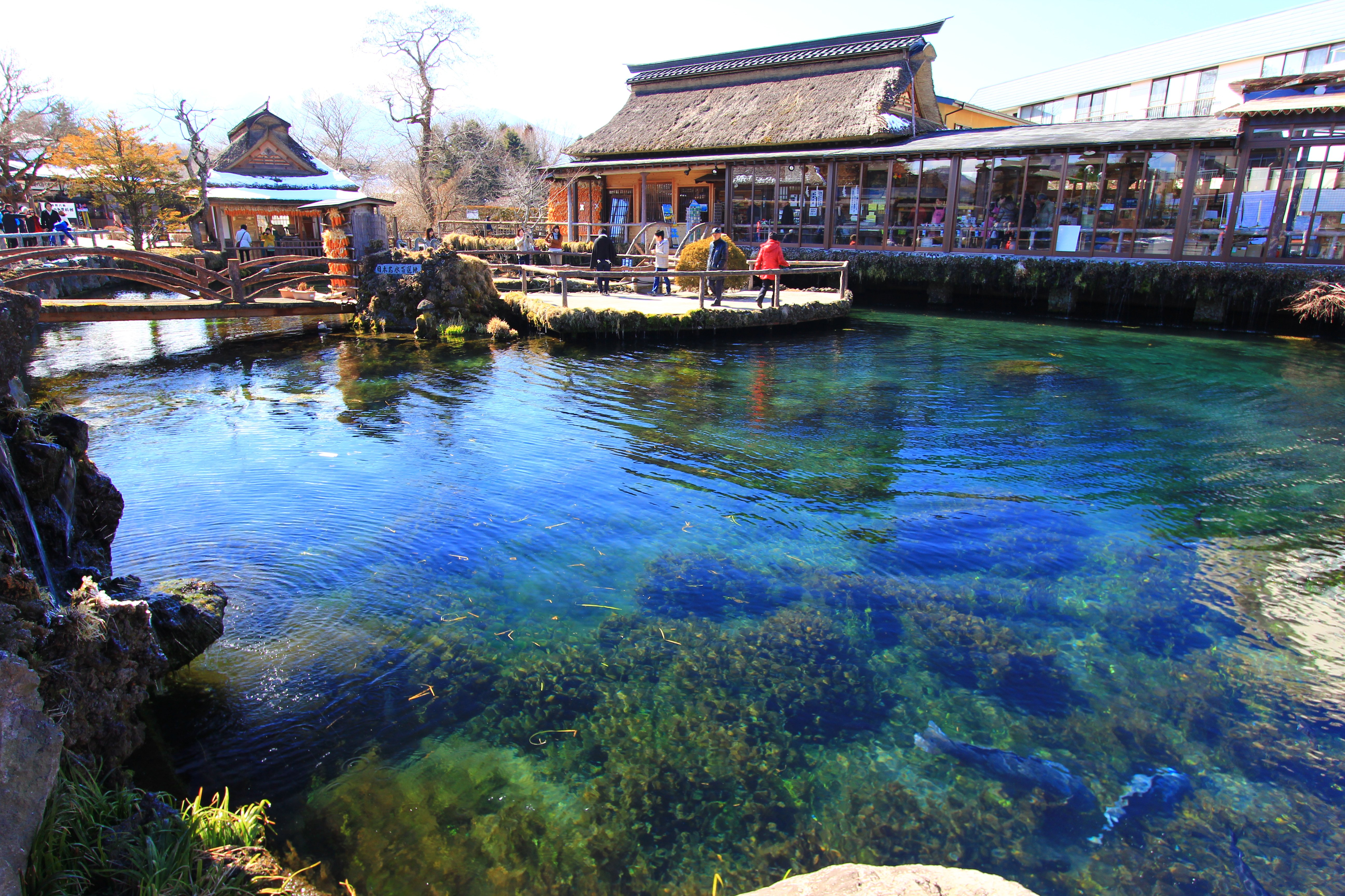 忍野村の中池。Panoramioより転載。